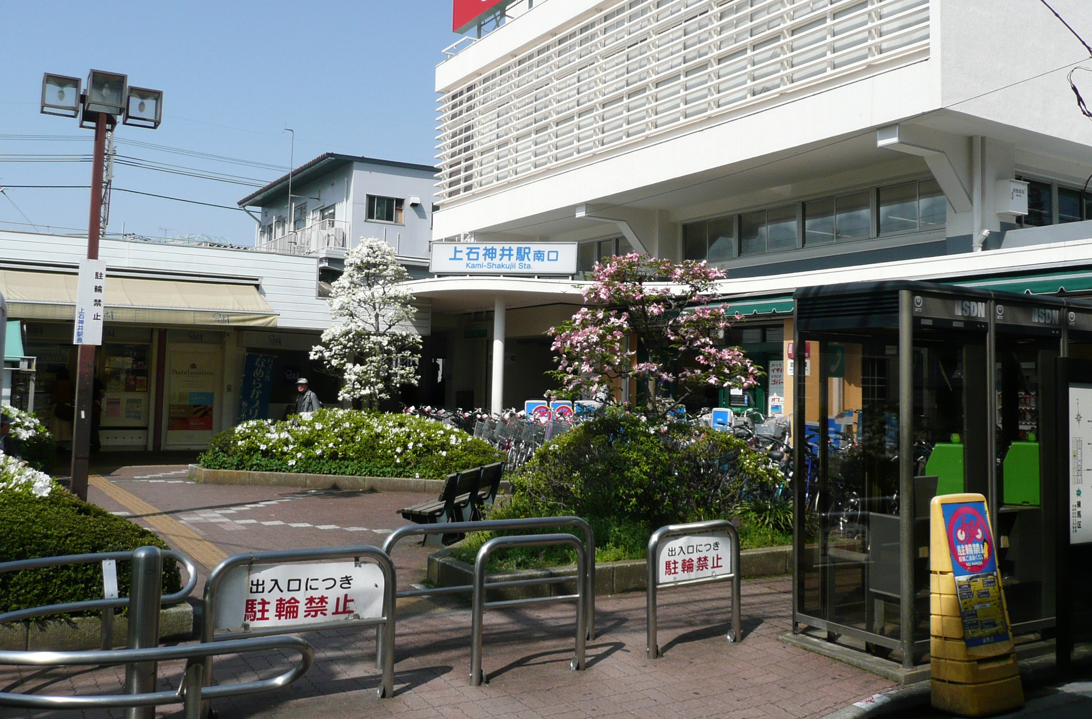 上石神井駅南口